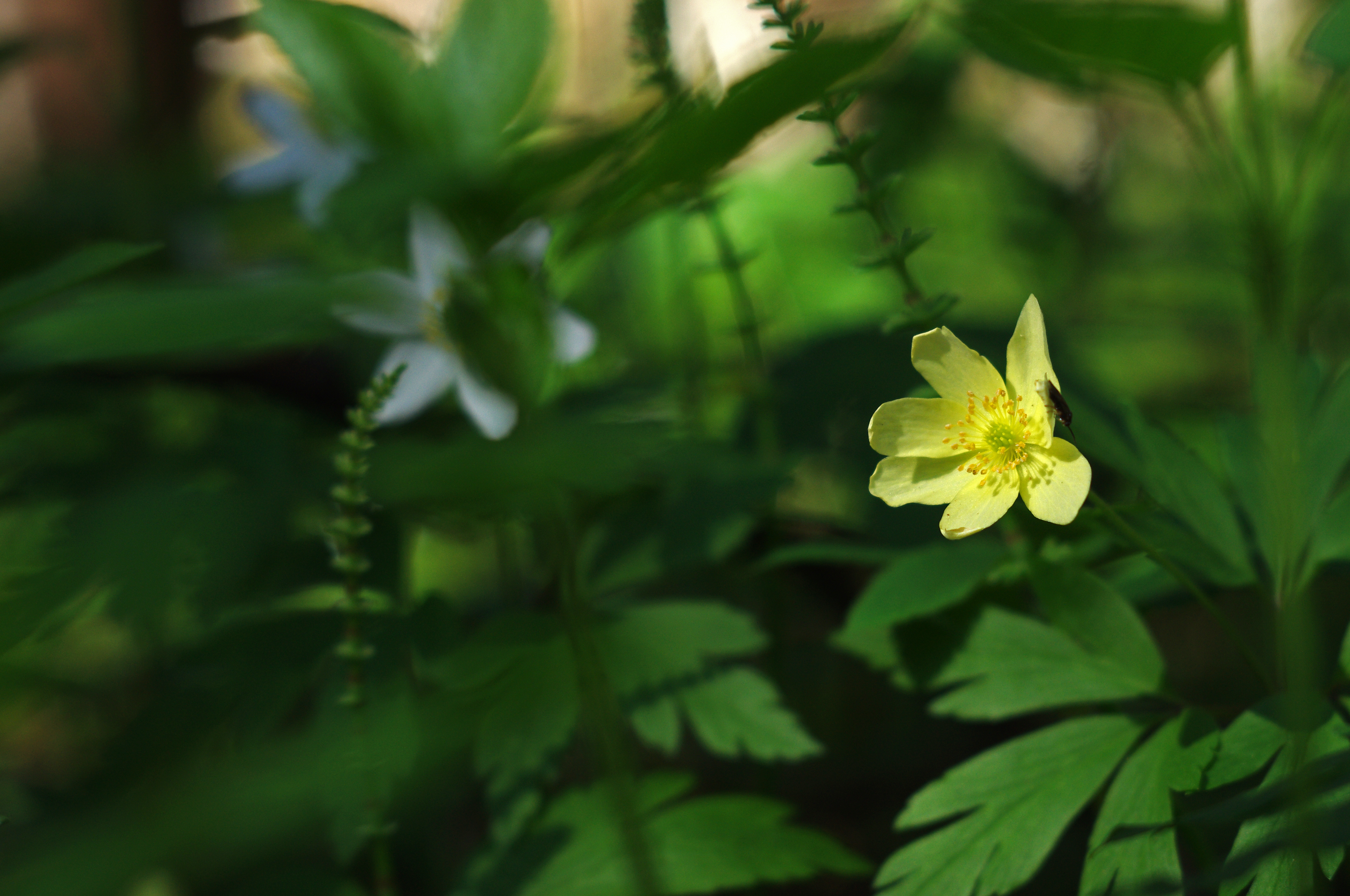 Värdülane ja võsaülane Tarvasjõe ääres 14. mail 2012